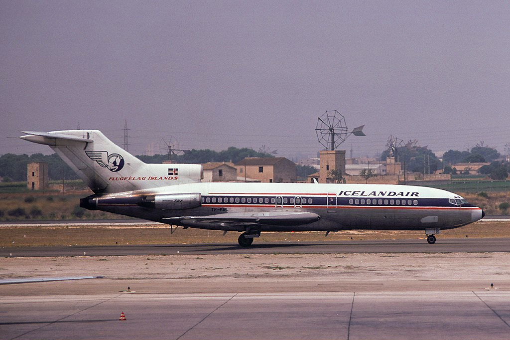 Icelandair Boeing 727-108C TF-FIE at Palma de Mallorca Airport